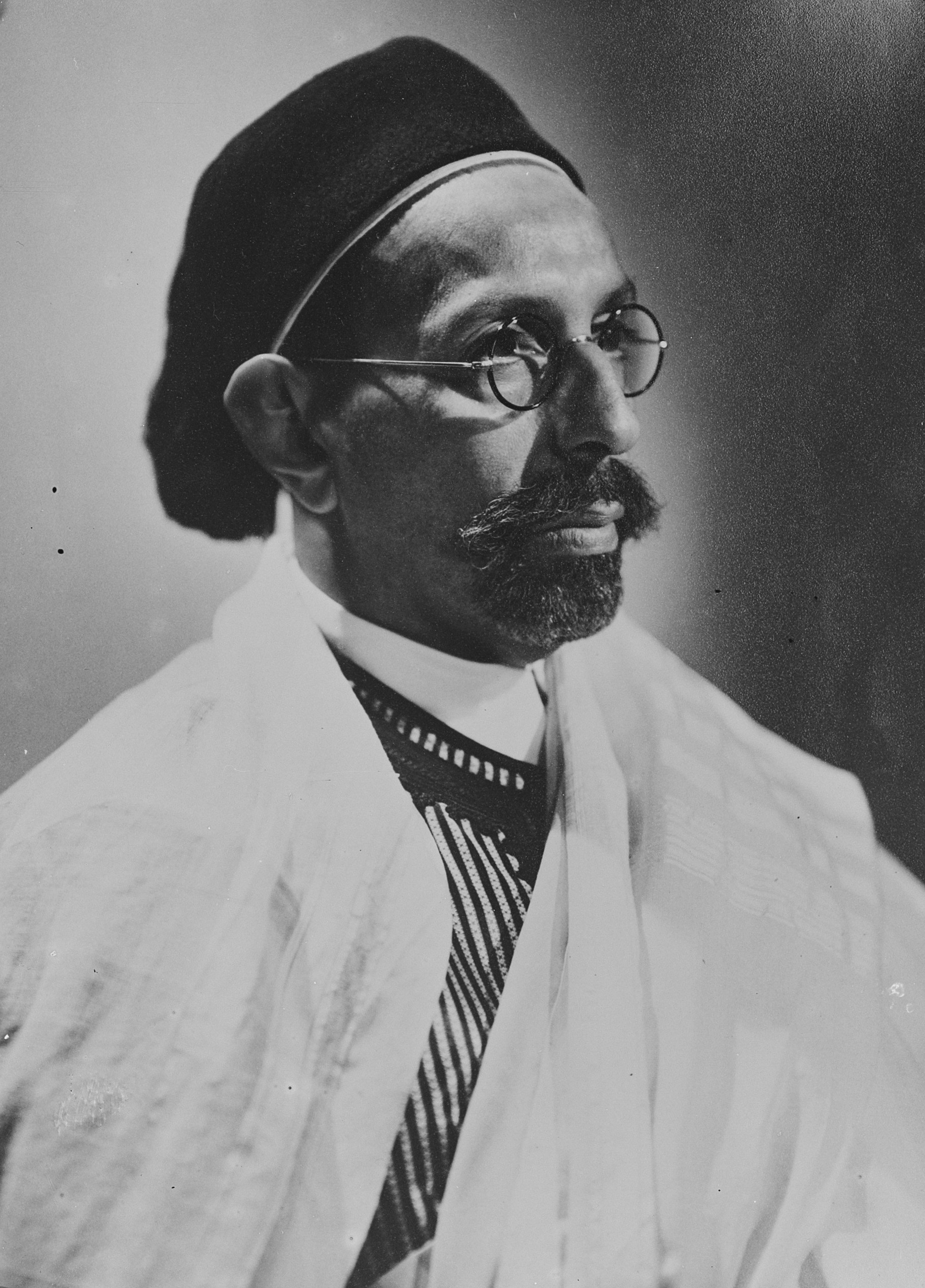 Emir van Cyrenaica nieuwe Koning van Libië per 1 januari 1951: Sayyid Mohammed Idris bin Muhammad al-Mahdi as-Senussi [Idris van Libië]